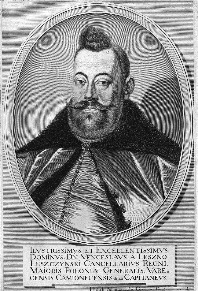 Wacław Leszczyński Grand Chancellor of the Polish Crown